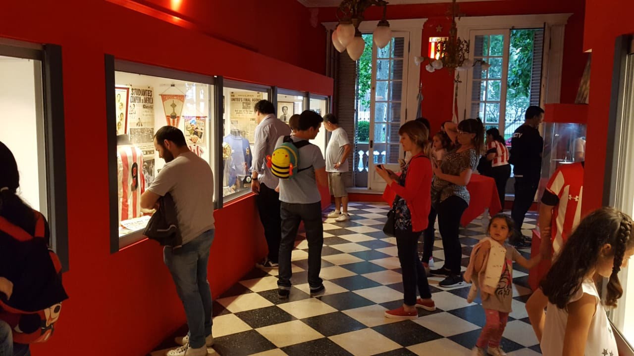 Visita guíada al Museo del Club Estudiantes de La Plata, durante la edición 2019 del evento "Museos a la Luz de la Luna"